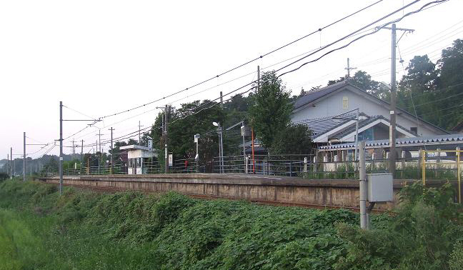 JR気山駅のホーム